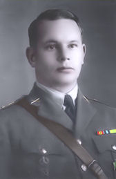 Gunnar Sanfrid Visapuu